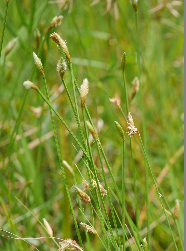 Eleocharis wichurae：シカクイ 2018/09/10 和歌山県：Wakayama Pref. Japan